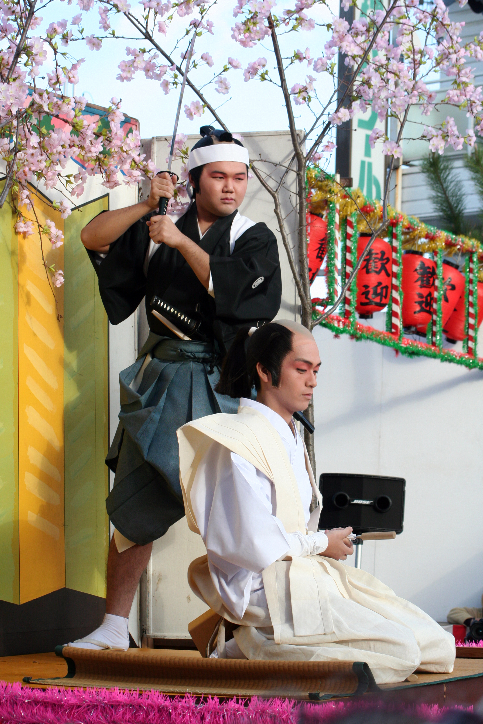 赤穂義士際。2009年12月14日に兵庫県赤穂市にて行われた祭りの様子。